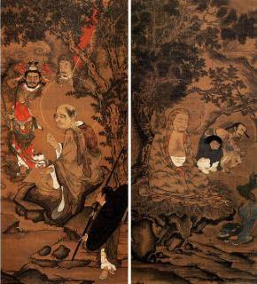 나한도는 일반적으로 선월양(禪月樣)과 이용안양(李龍眼樣)의 이대양식으로 구분하고 있으며 이 그림은 그 가운데 후자에 속한다고 말할 수 있다. 표현기법에서 색채는 윤곽과 나무, 바위 등에 묵을 사용하고 있으나 그 이외의 부분에는 붉은색, 군청색, 녹청색 그리고 백색안료 등의 원색과 자주, 황토계의 중간색을 혼용하고 있어서 매우 다채롭다. 그와 더불어 인물의 안면은 물론 법의, 특히 수목의 묘사가 매우 정치(精緻)하여 전체적으로 화려한 인상을 갖게 한다. 이와 같게 하는 자료로서 매우 가치가 높다고 할 수 있다.